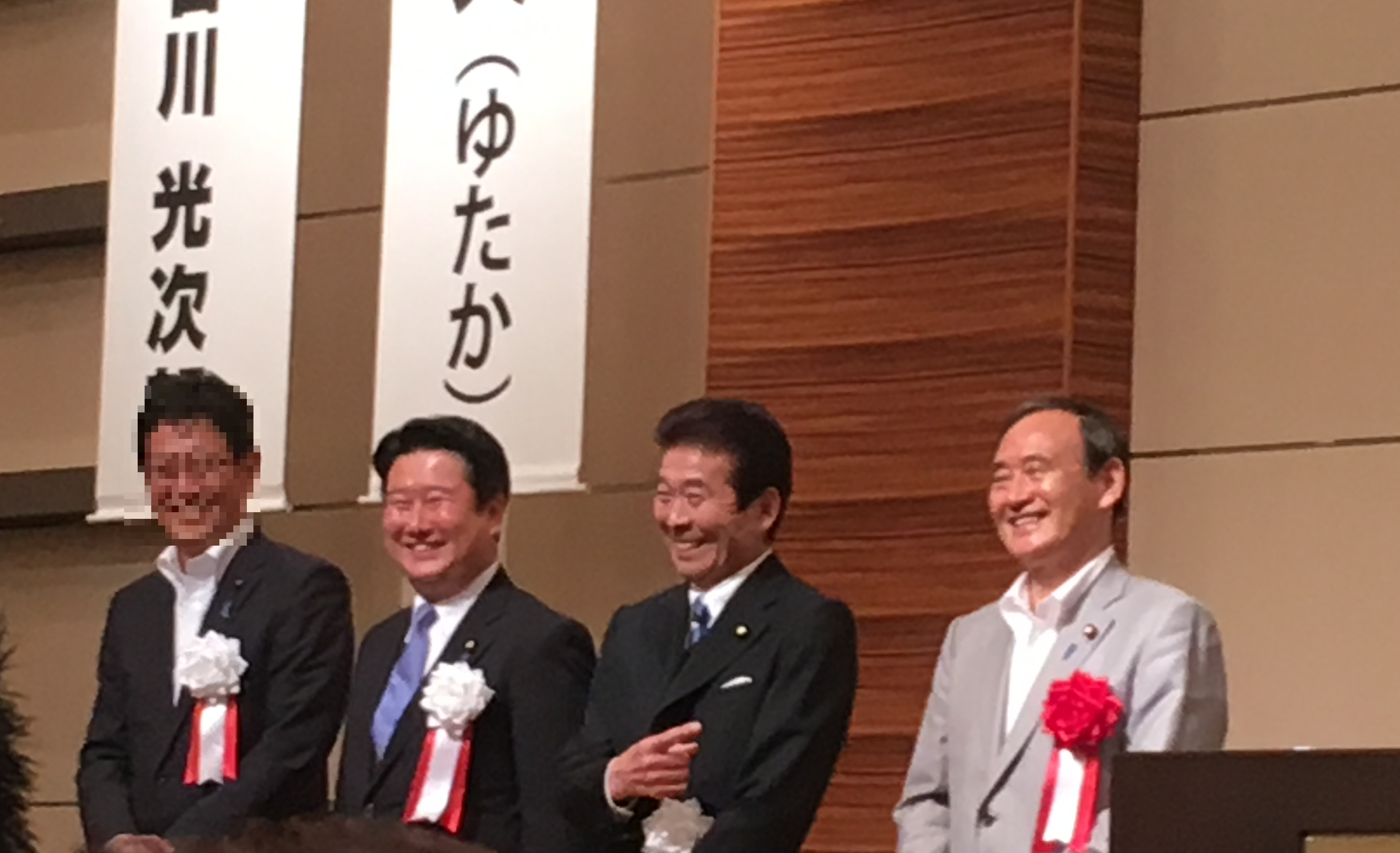 菅義偉、中野正志、和田政宗。2016年7月4日、第24回参議院議員選挙宮城選挙区の自民党・日本のこころを大切にする党合同演説会にて。